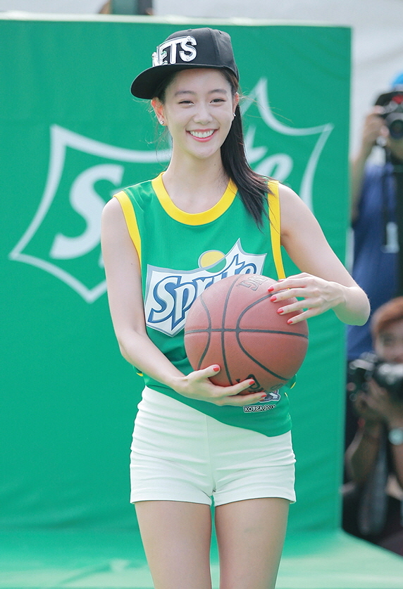 클라라 2013 NBA 3X 여의도